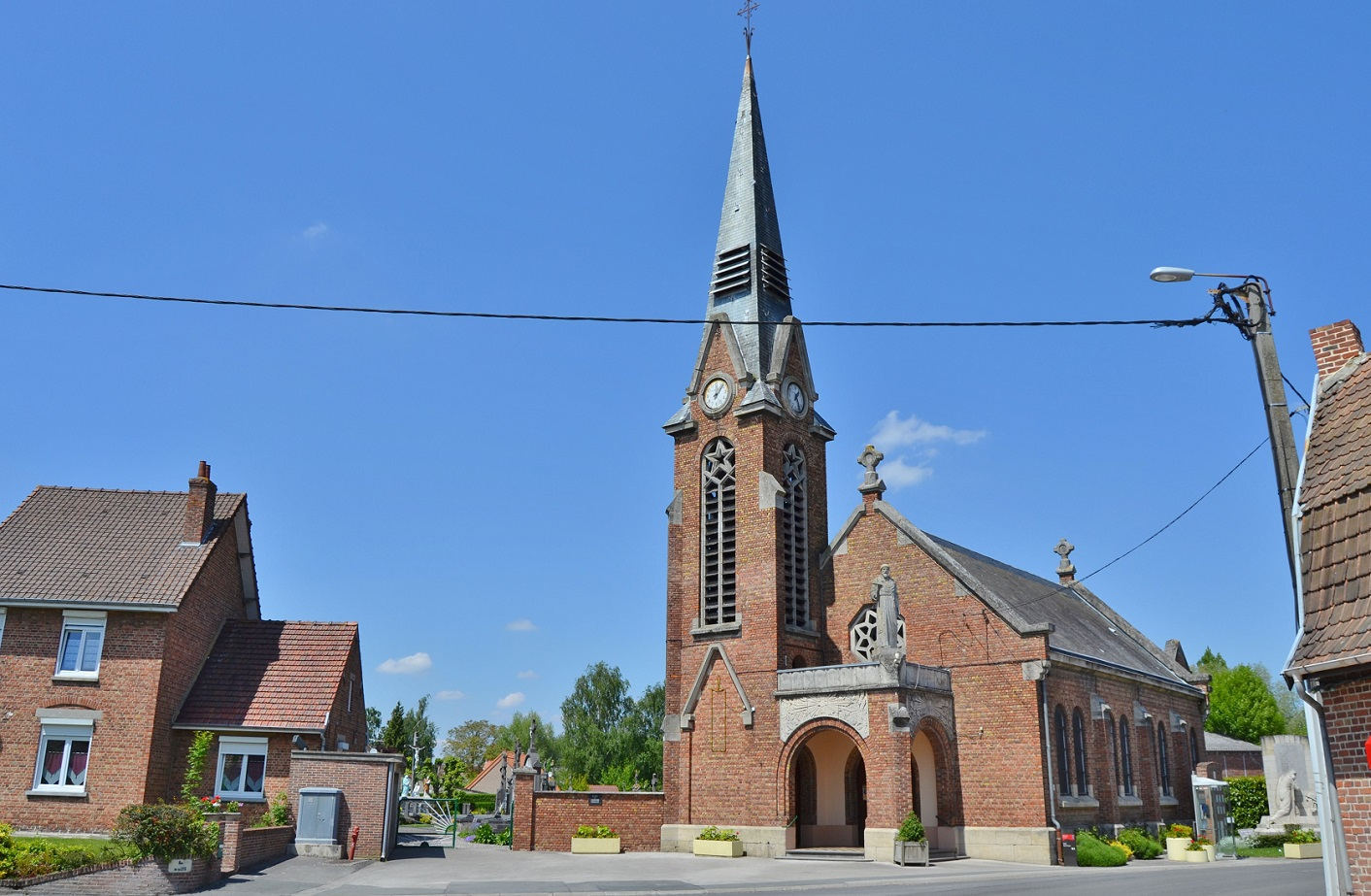 église St Florent